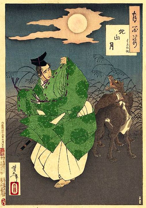 Toyohara Sumiaki, un musicien de l'empereur Go-Kashiwabara